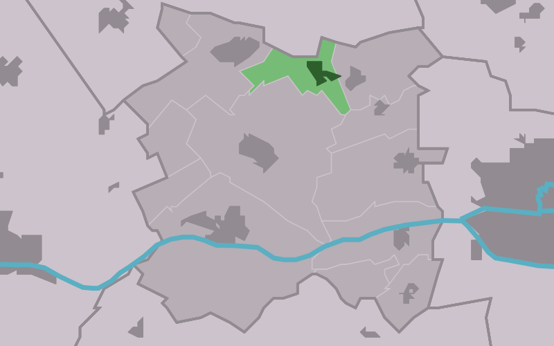 Kaartsje fan himrik fan Bitgum